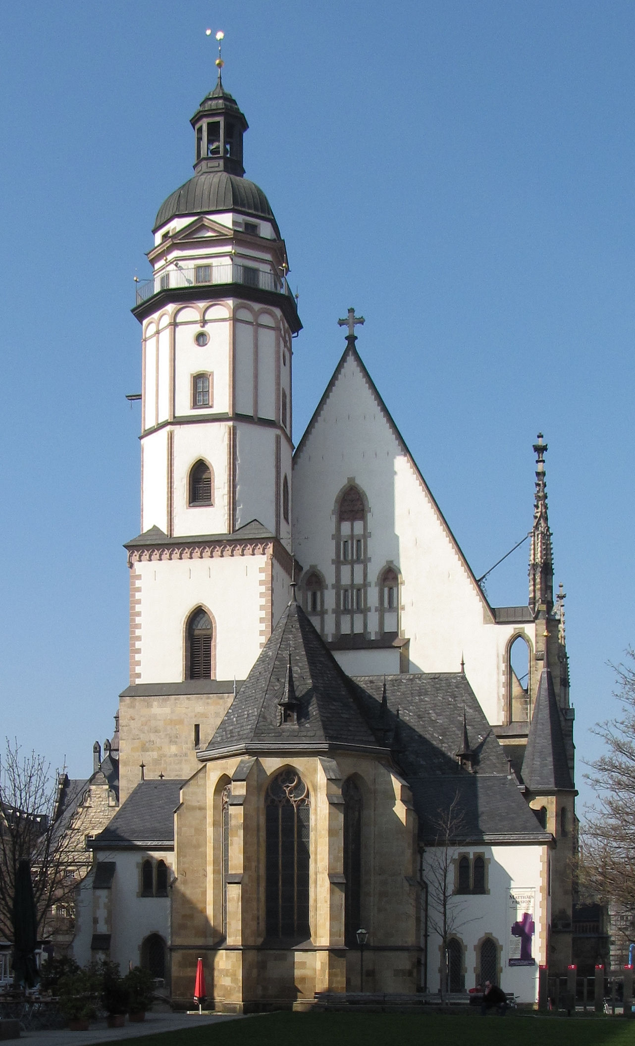 Thomaskirche Leipzig